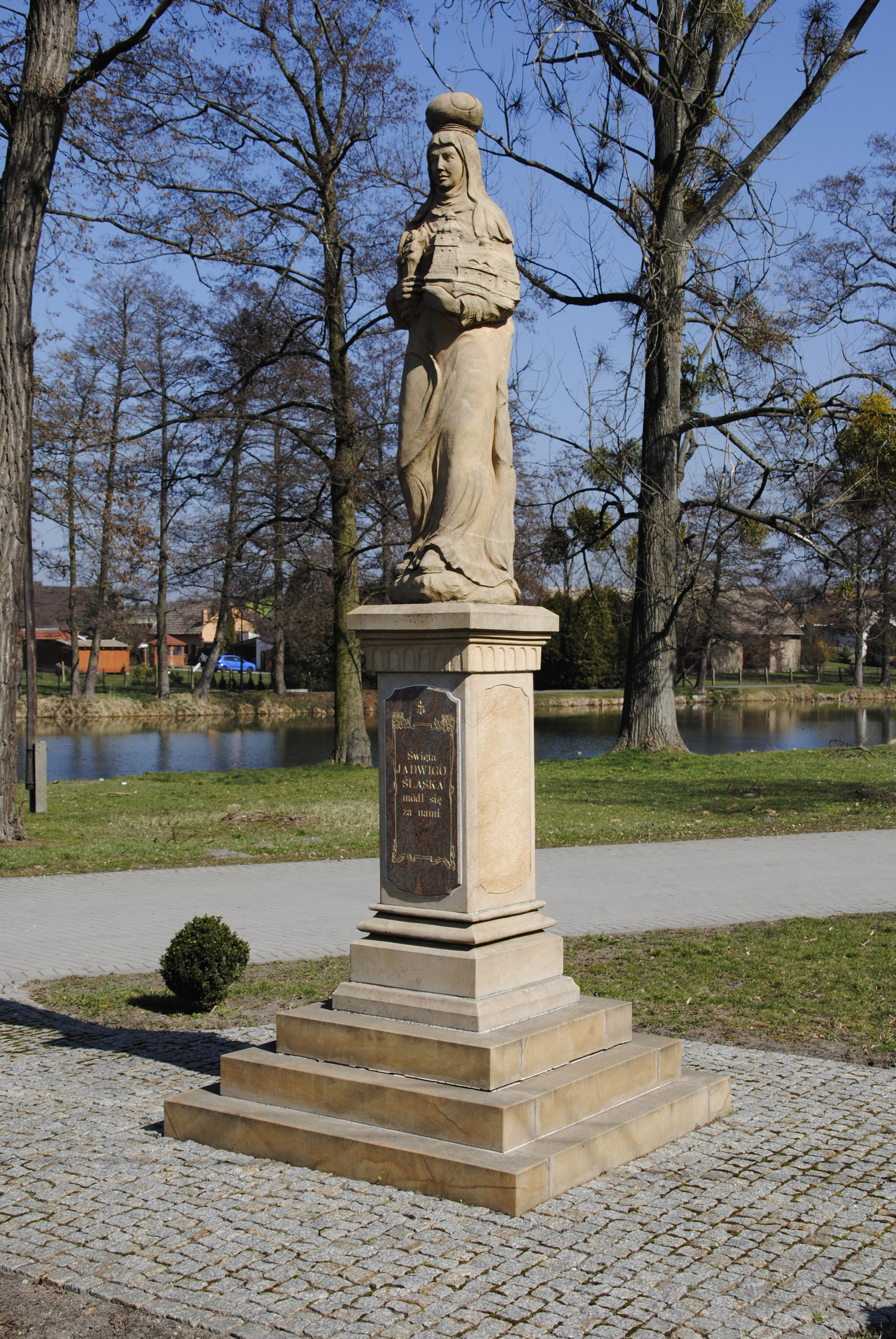 Statue St. Hedwig in Bierdzan in Oberschlesien